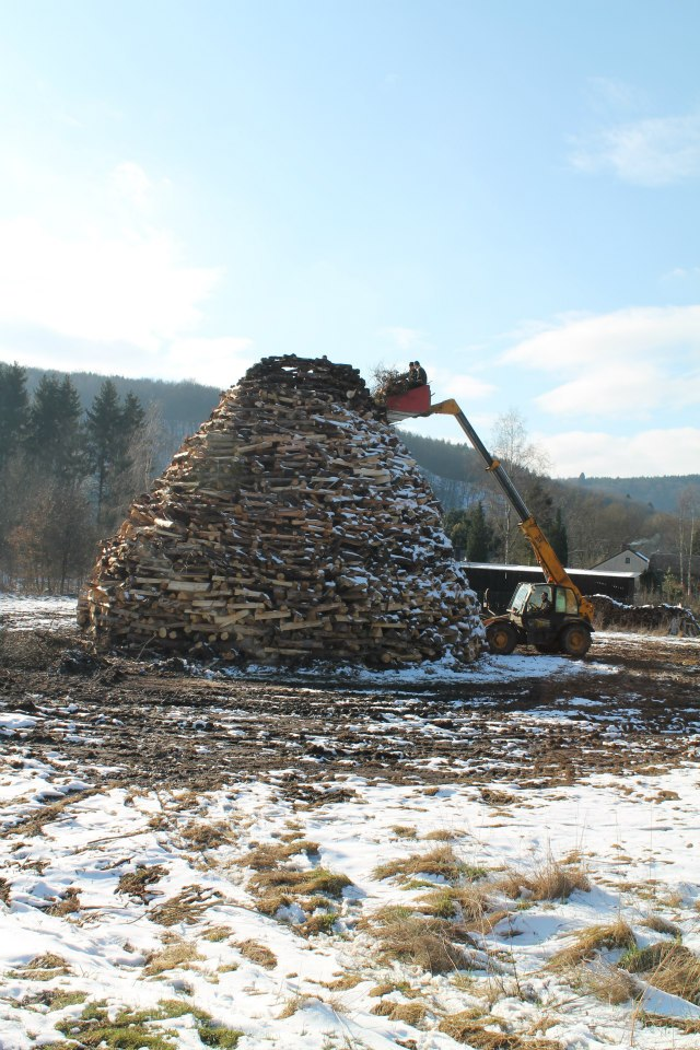 Montage du grand feu de Vresse 2013